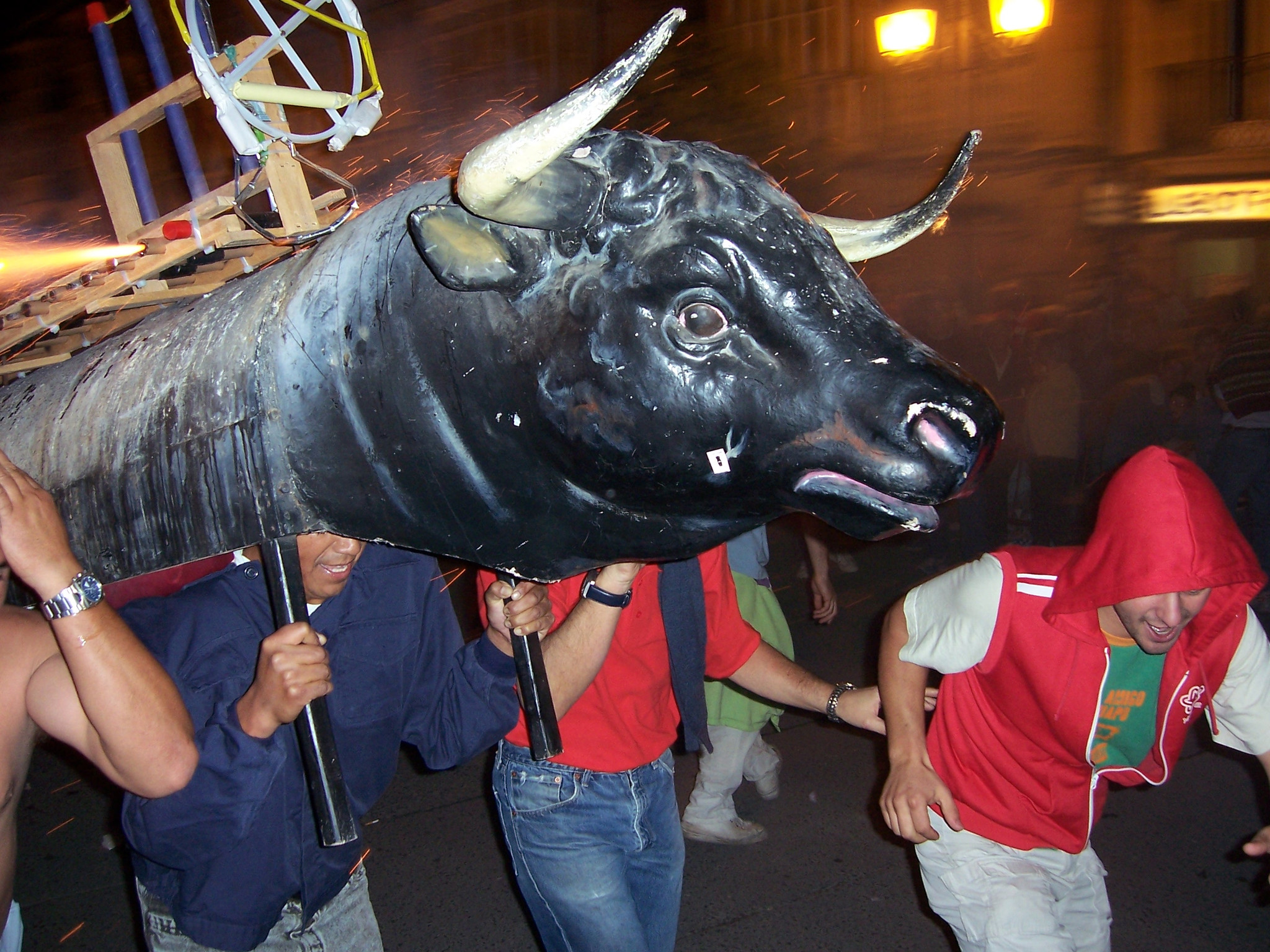 Toro de Fuego de Haro, La Rioja (España) en el día de la Jira a Fuente del Moro